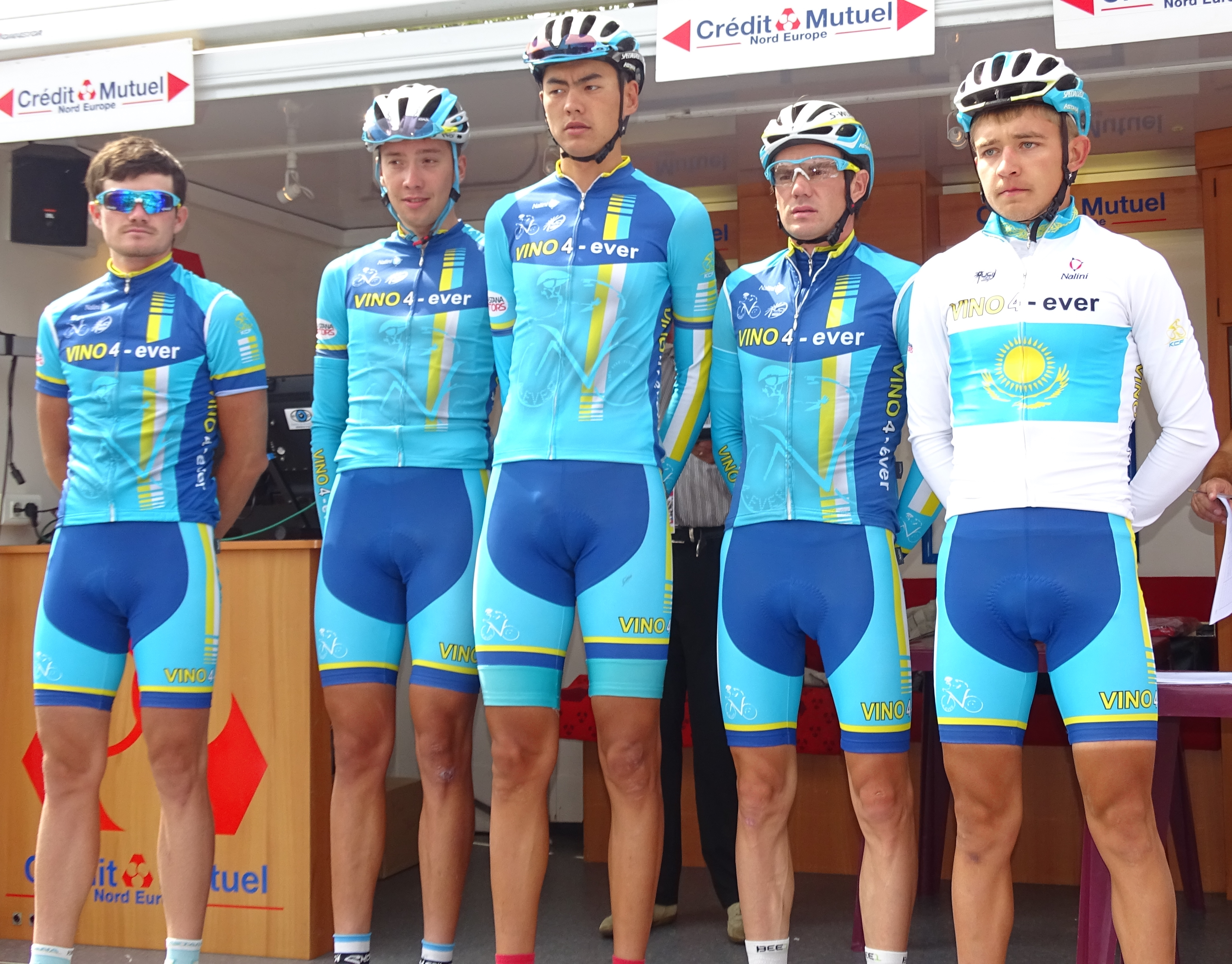 Reportage réalisé le mardi 25 août à l'occasion du départ et de l'arrivée du Grand Prix des Marbriers 2015 à Bellignies, Nord-Pas-de-Calais, France.